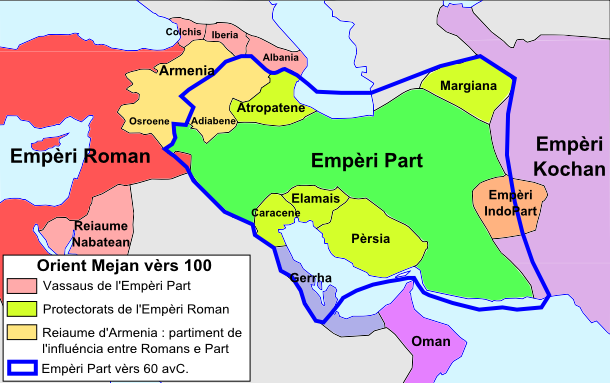 Orient Mejan vèrs 100.